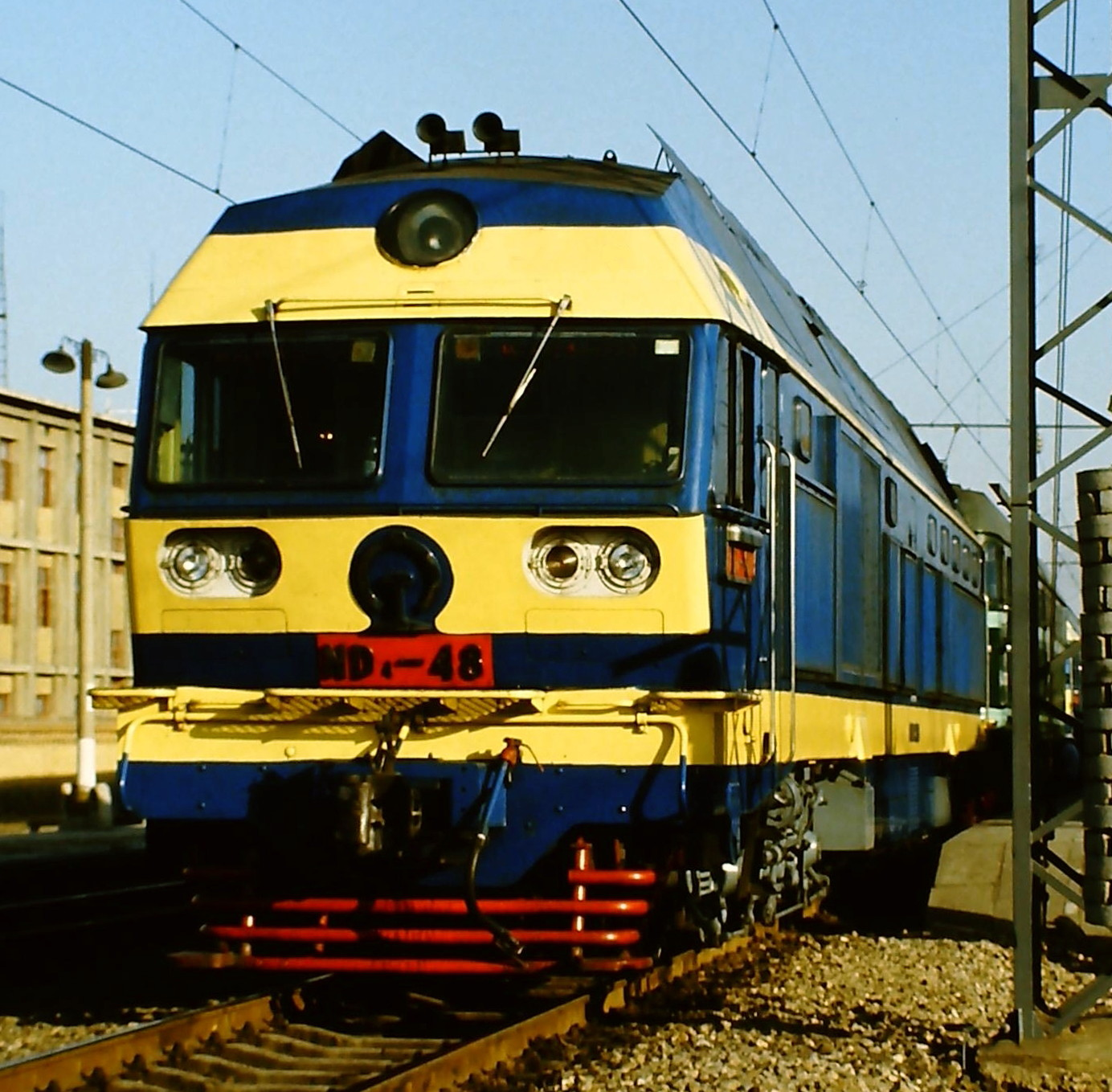 CNR ND4-48 (Datong)